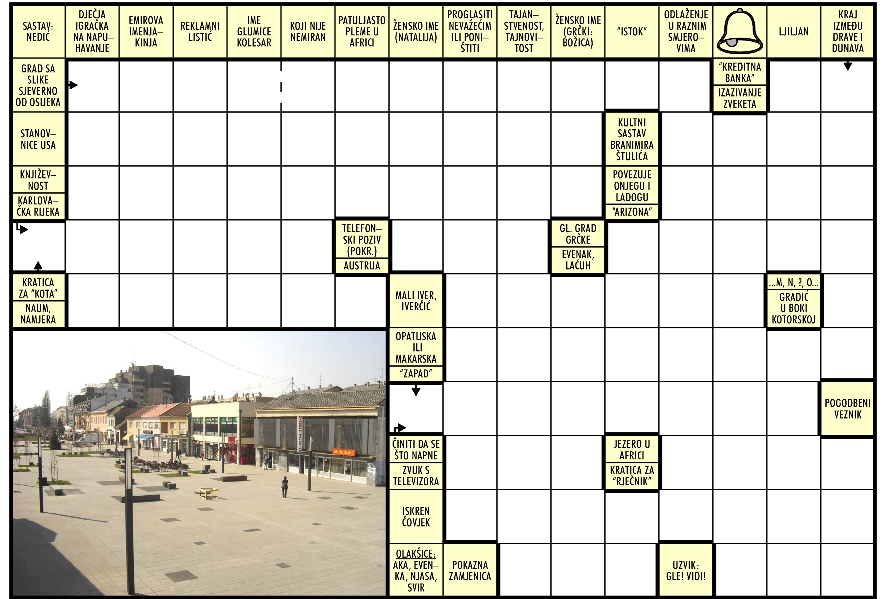 Križaljka objavljena u 11-12. broju Epicentra Slavonije (27. VII. 2011)